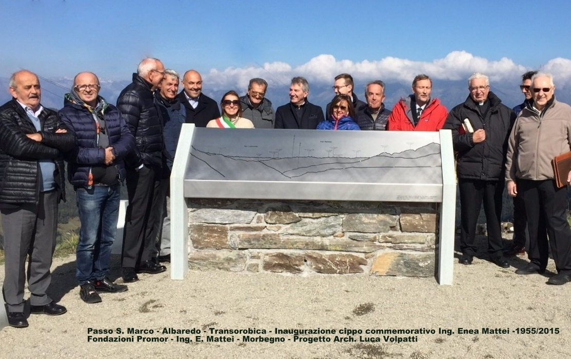 ALBAREDO (SO) ITALY - Cerimonia di inaugurazione Cippo commemorativo sessantennale Enea Mattei